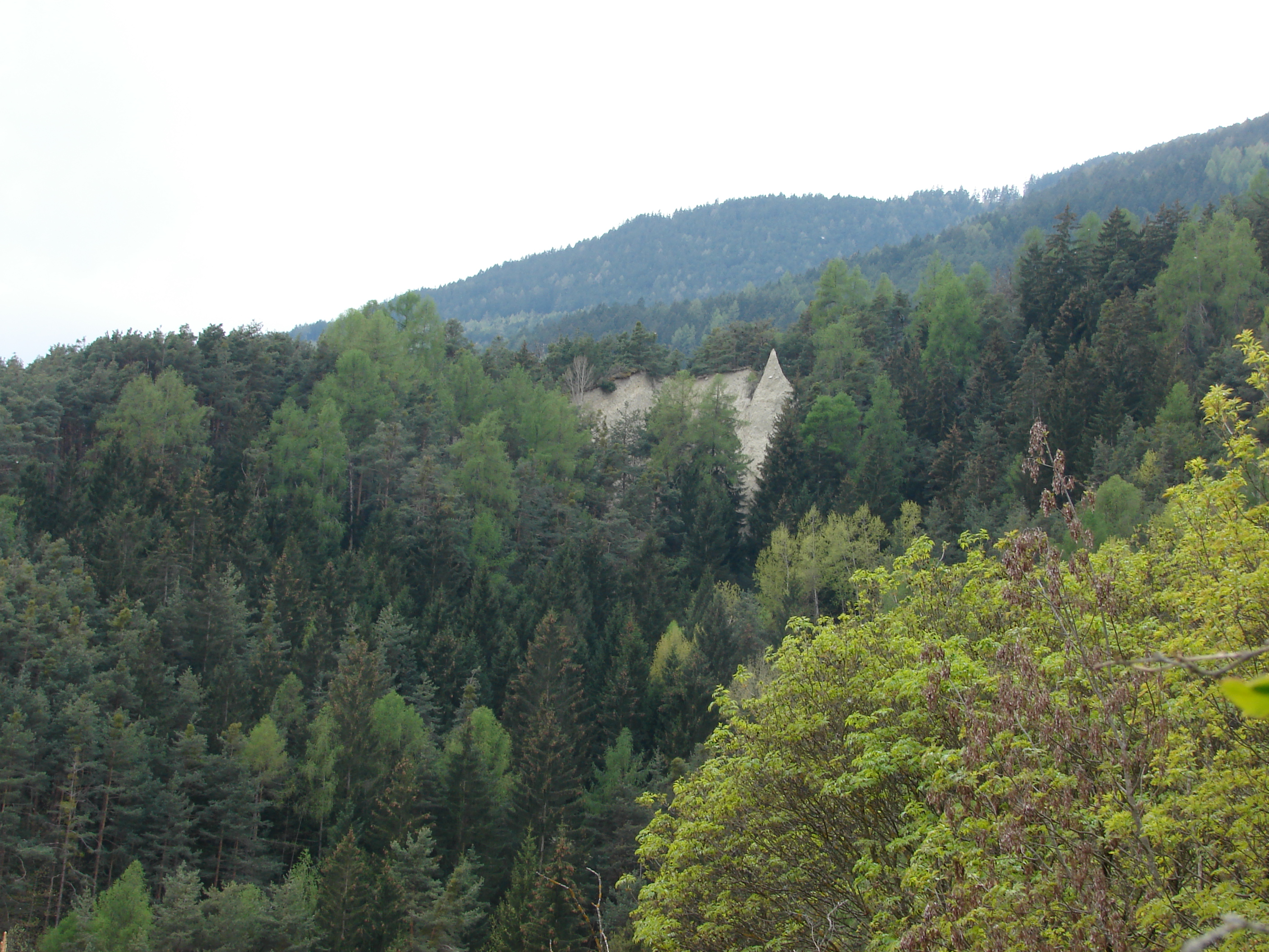 Pfefferlahn / Weißlahn / Ebnerlahn